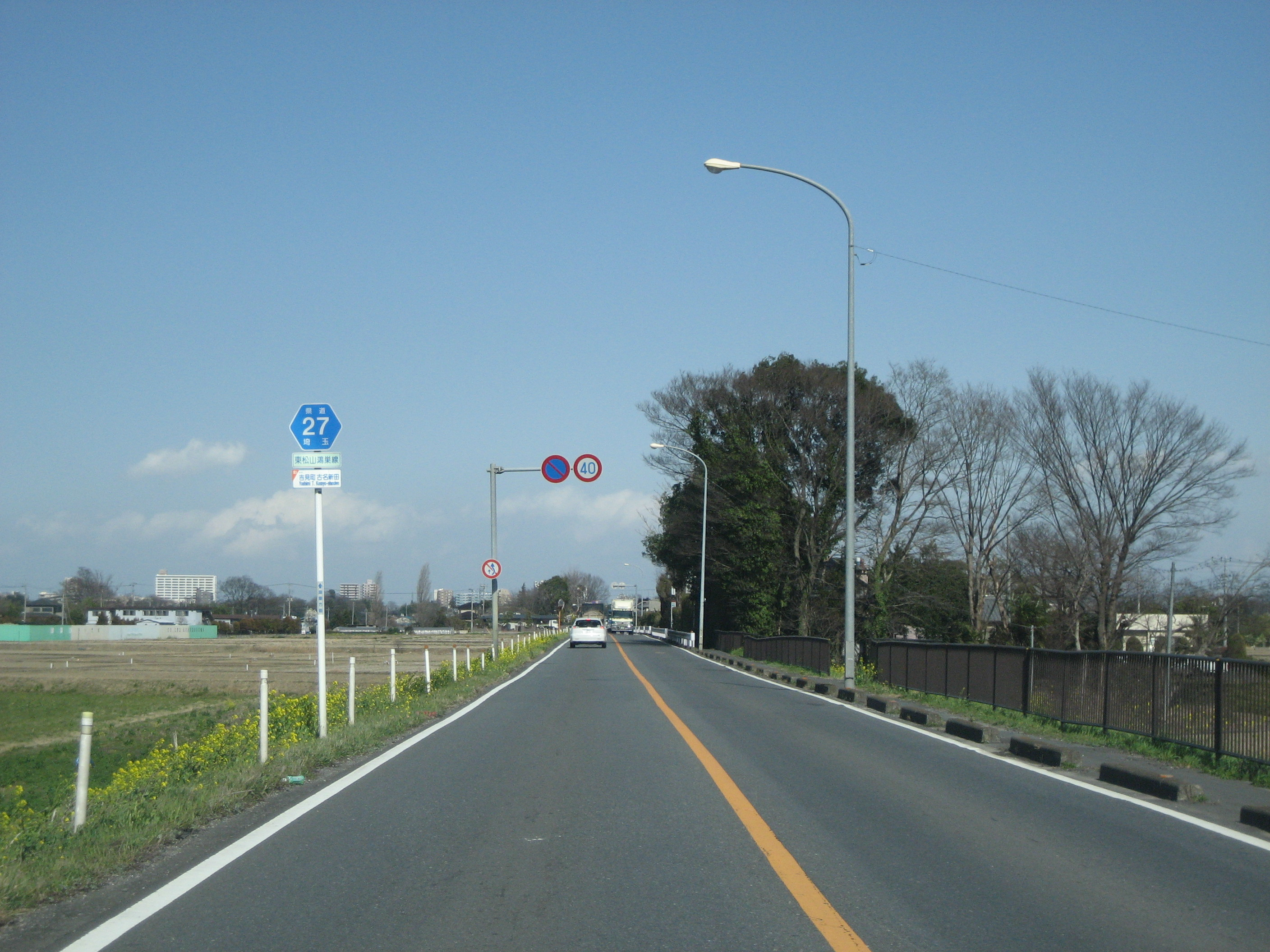 埼玉県道27号線吉見町内２